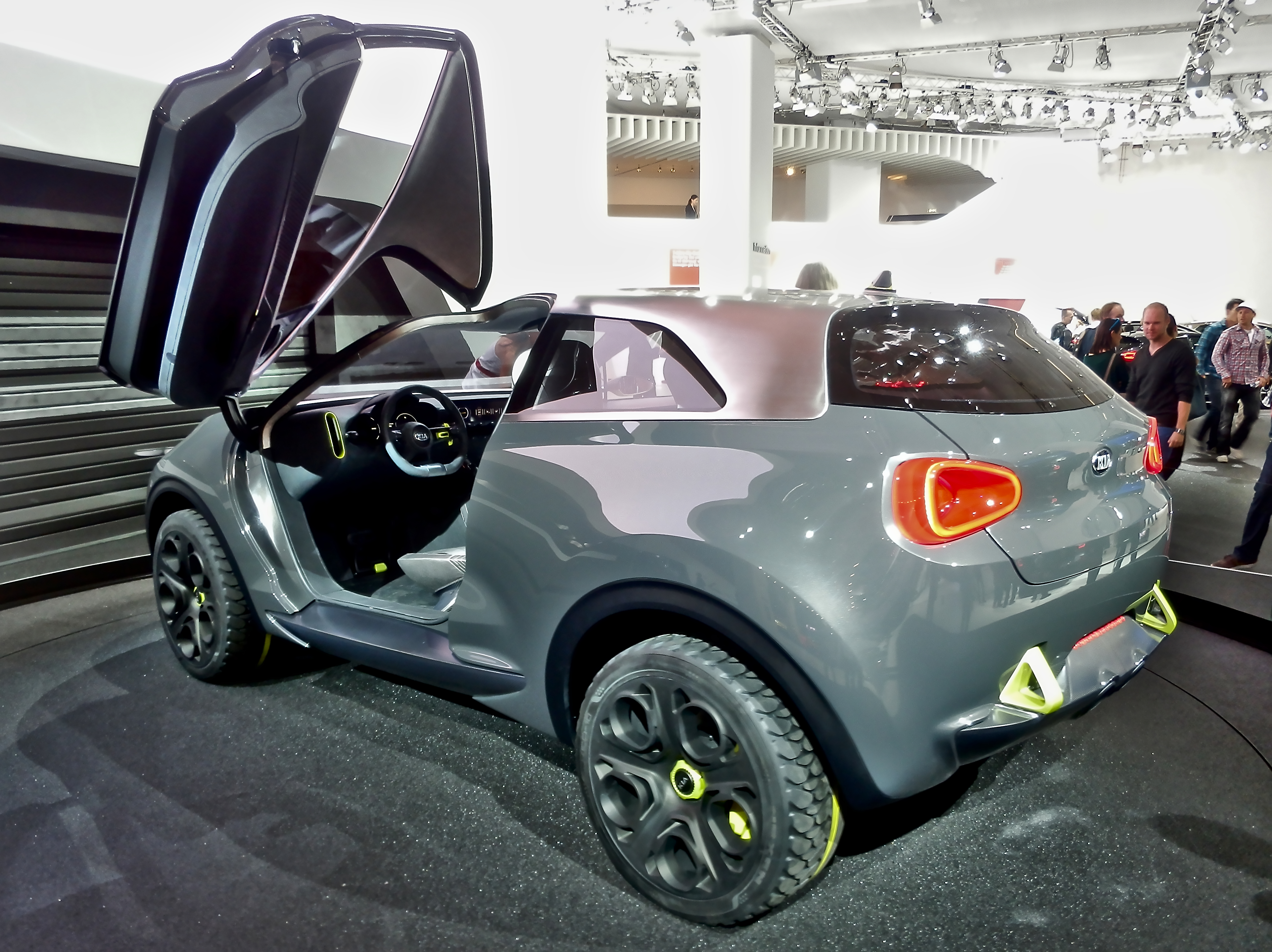 Kia Niro Concept at IAA 2013